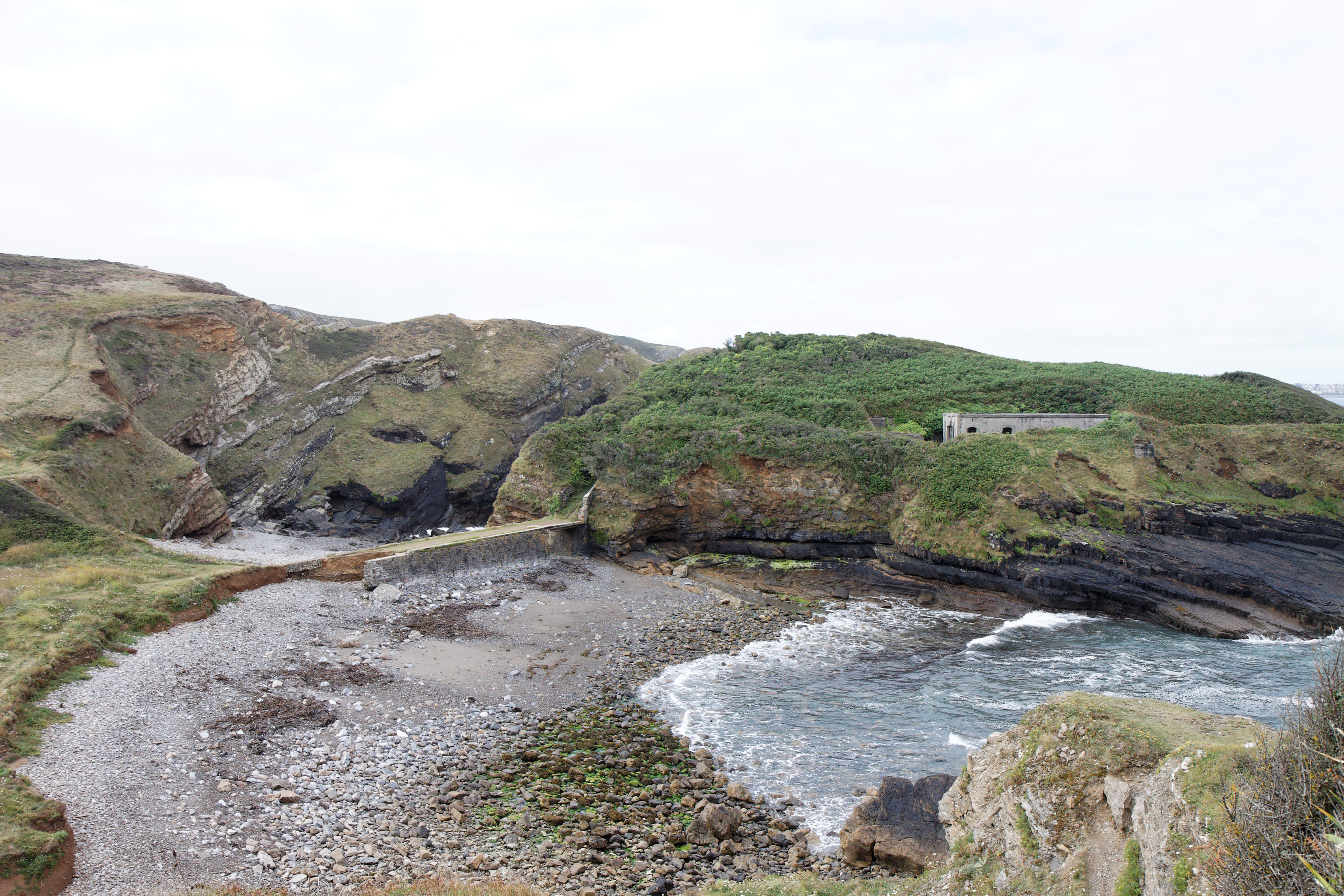 Vue partielle de l'îlot du Diable.